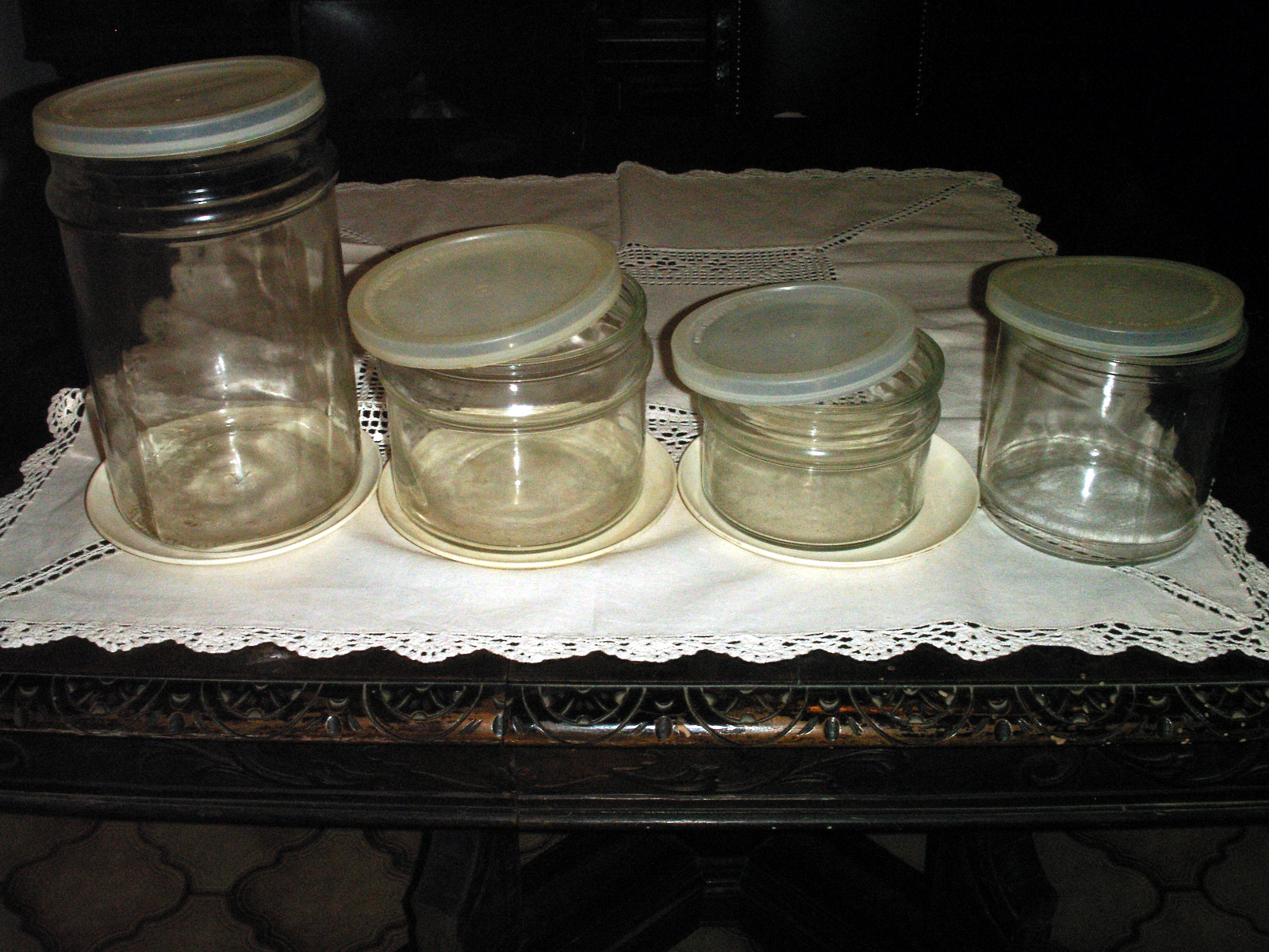 Conserva acciughe,arbanelle di varie dimensioni e capacità